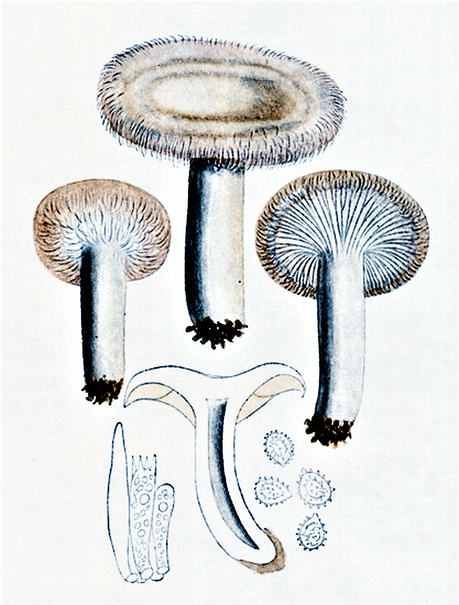 Giacomo Bresadola: 1. Lactarius torminosus (Schaeff., 1774) Gray (1821)